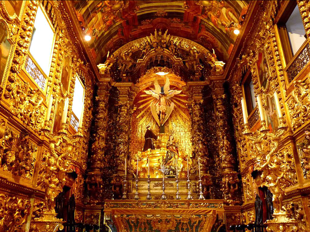 Igreja da Ordem Terceira de São Francisco da Penitência (Rio de Janeiro) Brasil. Foto por cortesia de